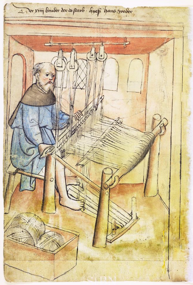 Text : "Der xiiii bruder der do starb, hyeß hans weber". Description (nuernberger-hausbuecher.de) : "Der Bruder sitzt an seinem Webstuhl und führt mit der Rechten das Schiffchen, während er mit den nackten Füße die Mechanik bewegt, die über ein an der Decke befestigtes Rollenwerk gesteuert wird." Weitere Informationen